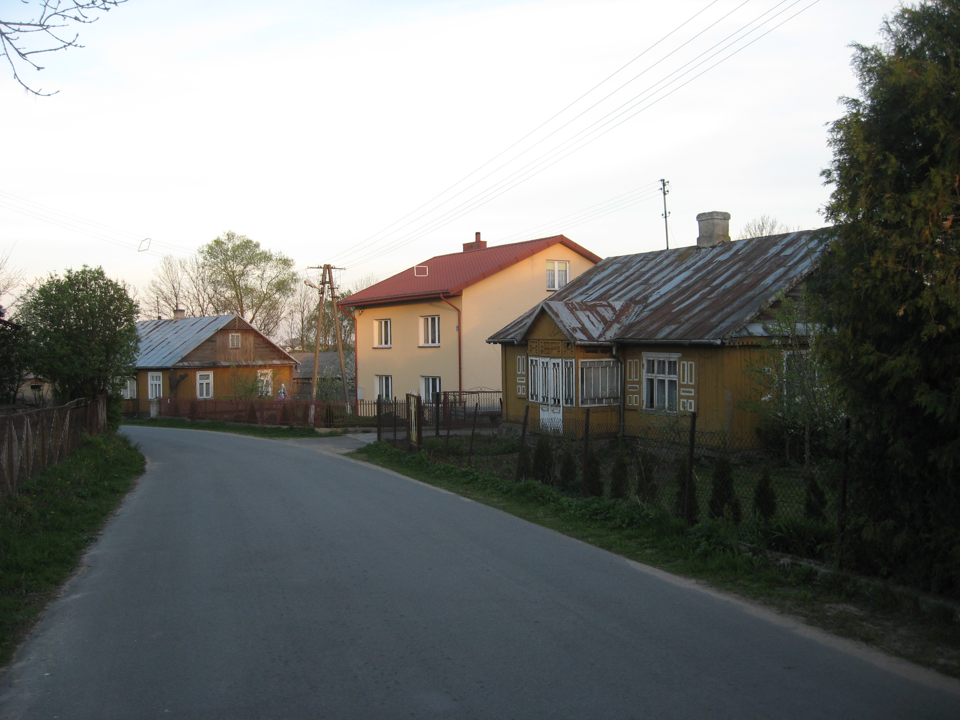 Wieś Stare Biernaty gmina Łosice